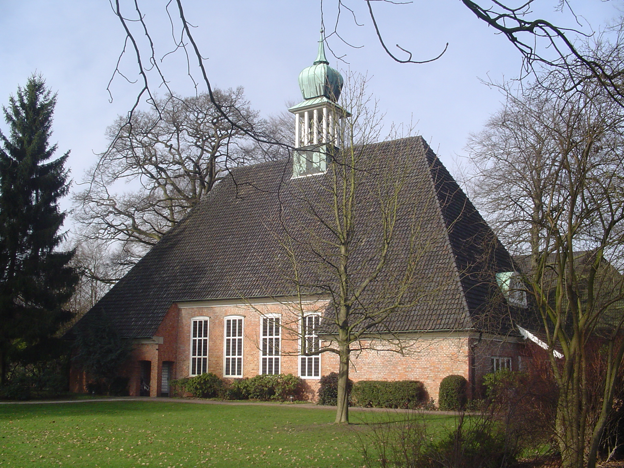 St. Remberti-Kirche in Bremen